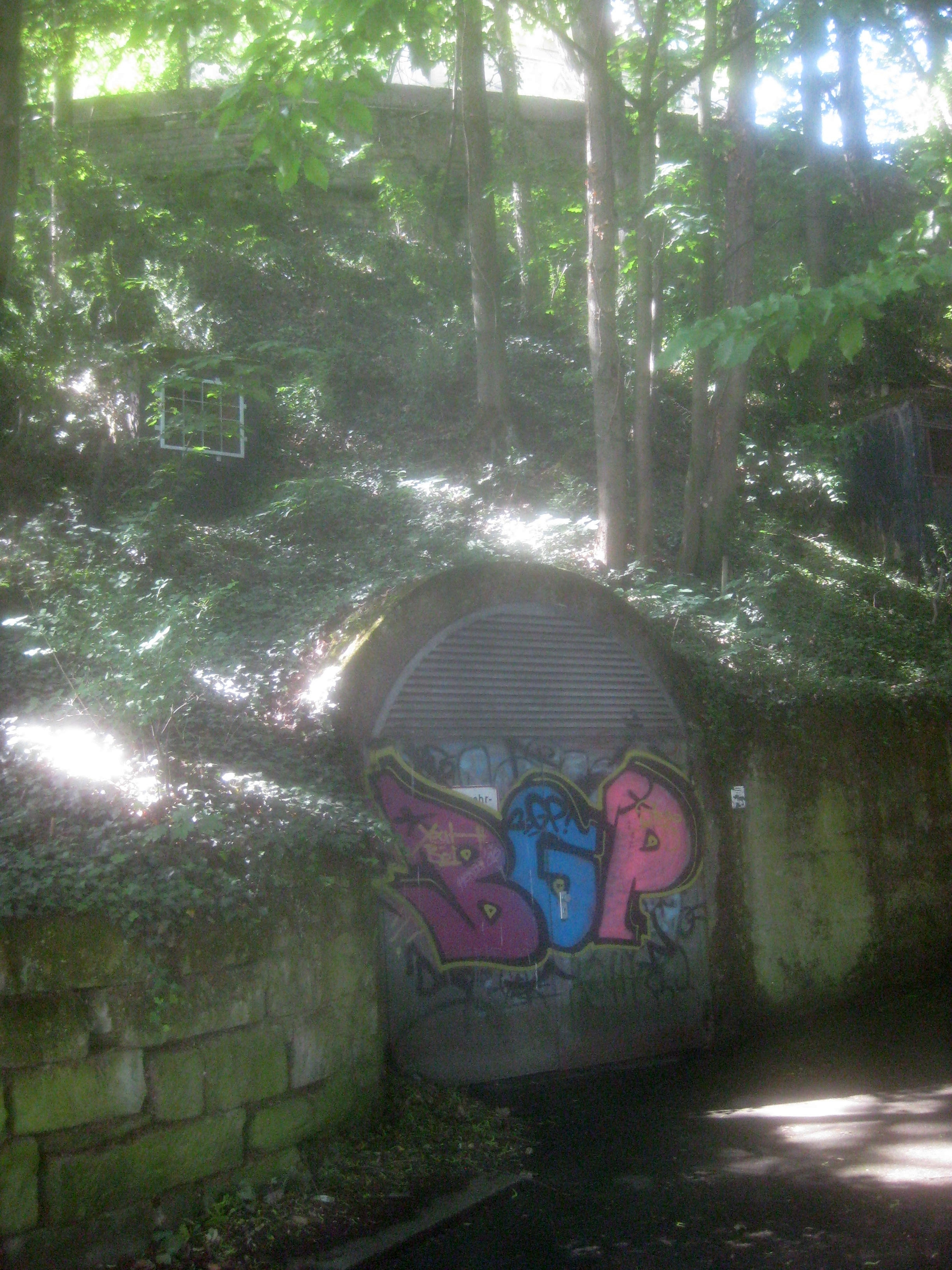 „Stollen Mühlkanal BW25“ (BW = Bauwerk), Luftschutzstollen in Stuttgart beim ehemaligen Mühlkanal, links vom Wera-Haus, Nißlestraße 22.